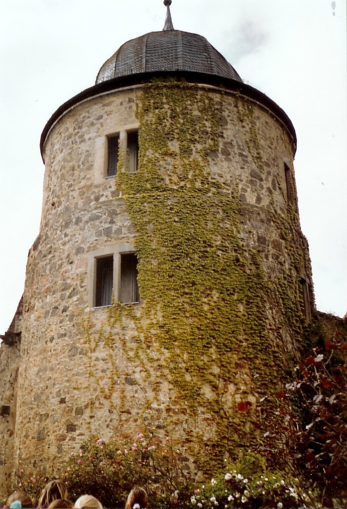 Ein Turm der Sababurg.